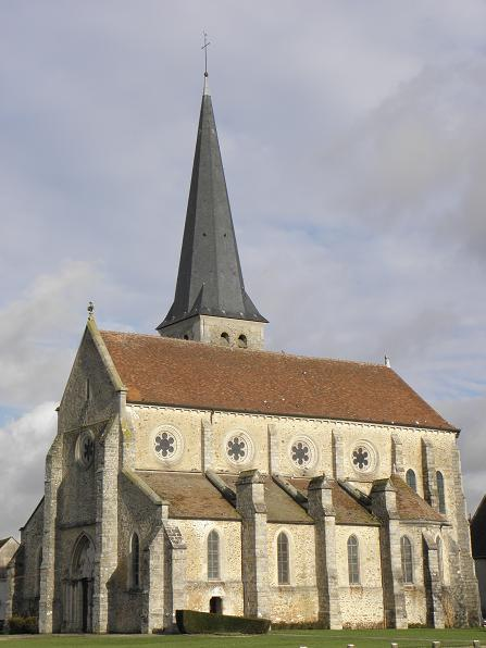 Église Notre-Dame-de-la-Nativité de Villeneuve-le-Comte (77).